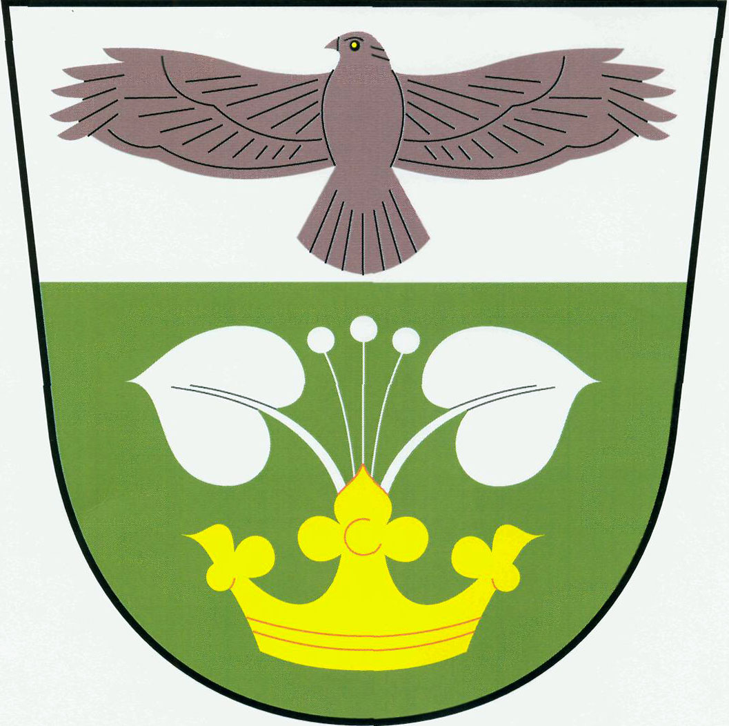 Znak obce Kanina